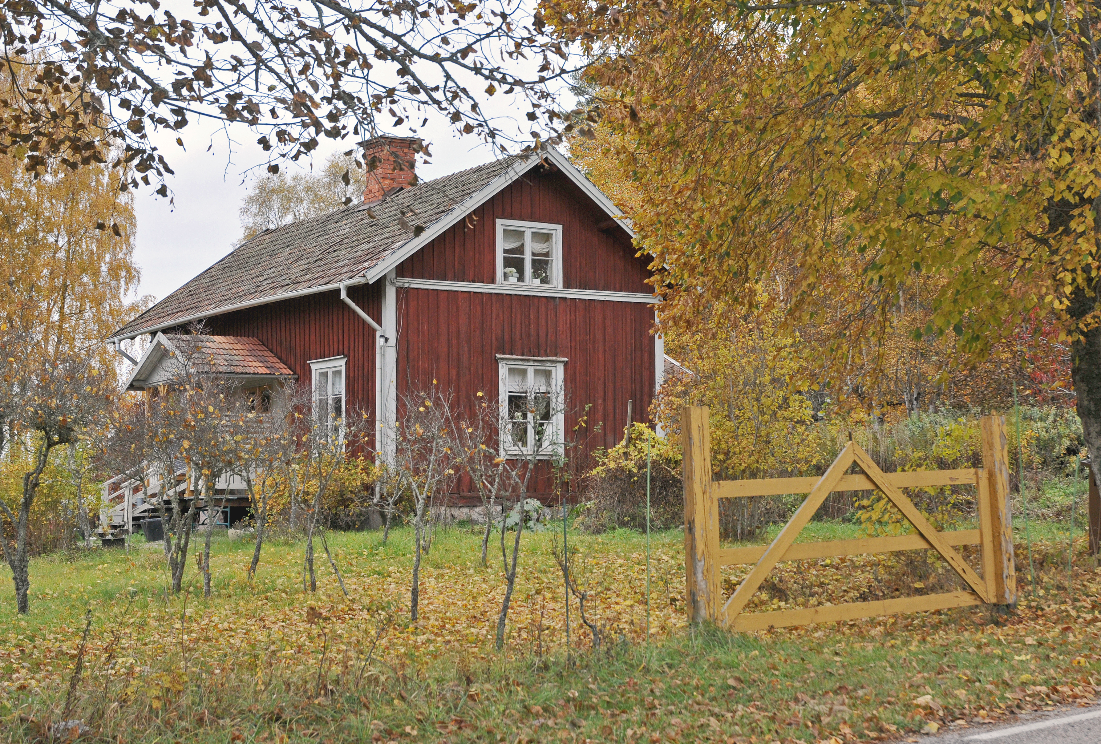 Sandstugan i Bärbo socken, 2013.